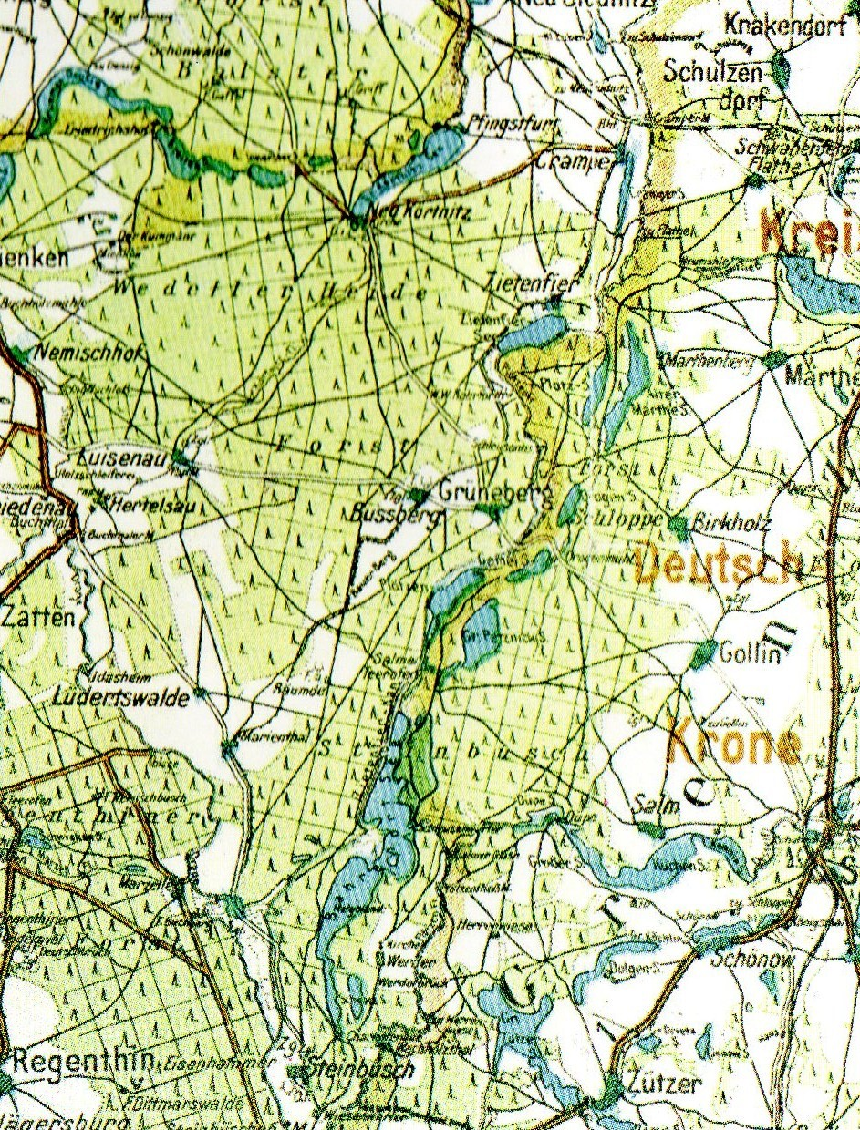 Mapa Puszczy Drawskiej z uwzględnieniem kolei wąskotorowej Dąbrowa - Krępa Krajeńska.